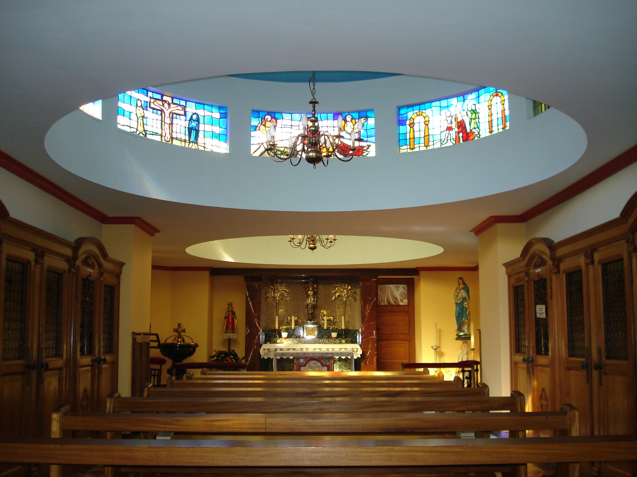 Thierenbach : Chapelle du Bon Pasteur (ou chapelle de la réconciliation)